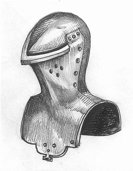 Hełm turniejowy, tzw.Żabi pysk autor: Tomasz Steifer, 2006 r.